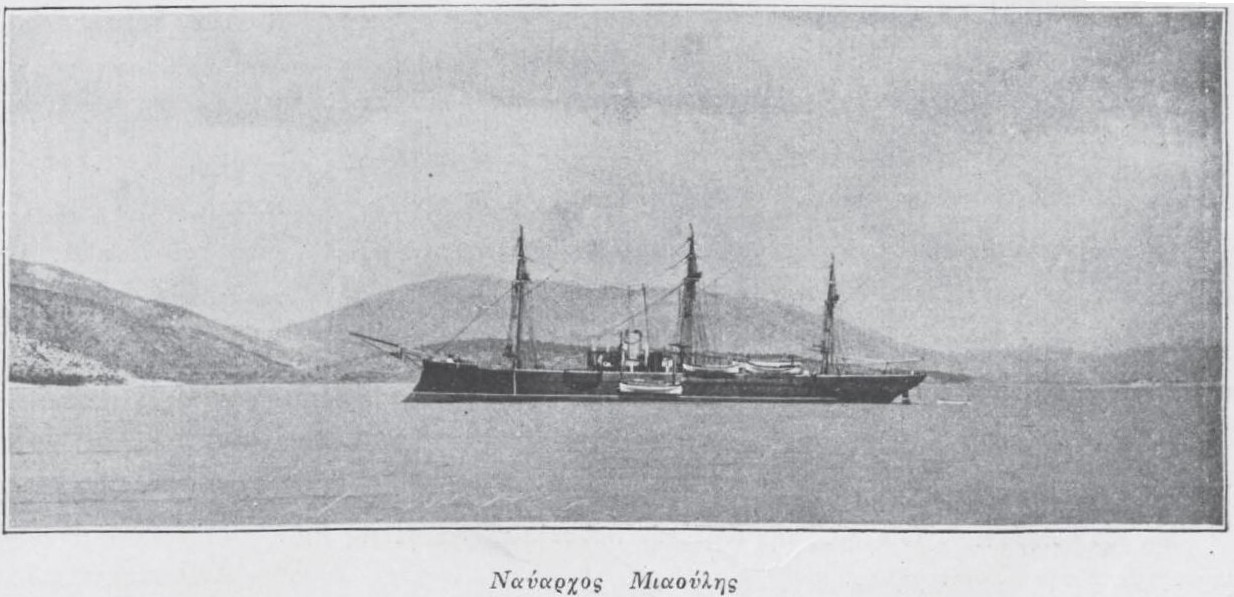 Μιαούλης Ι (Κανονιοφόρος) Griechischer Kanonenträger.